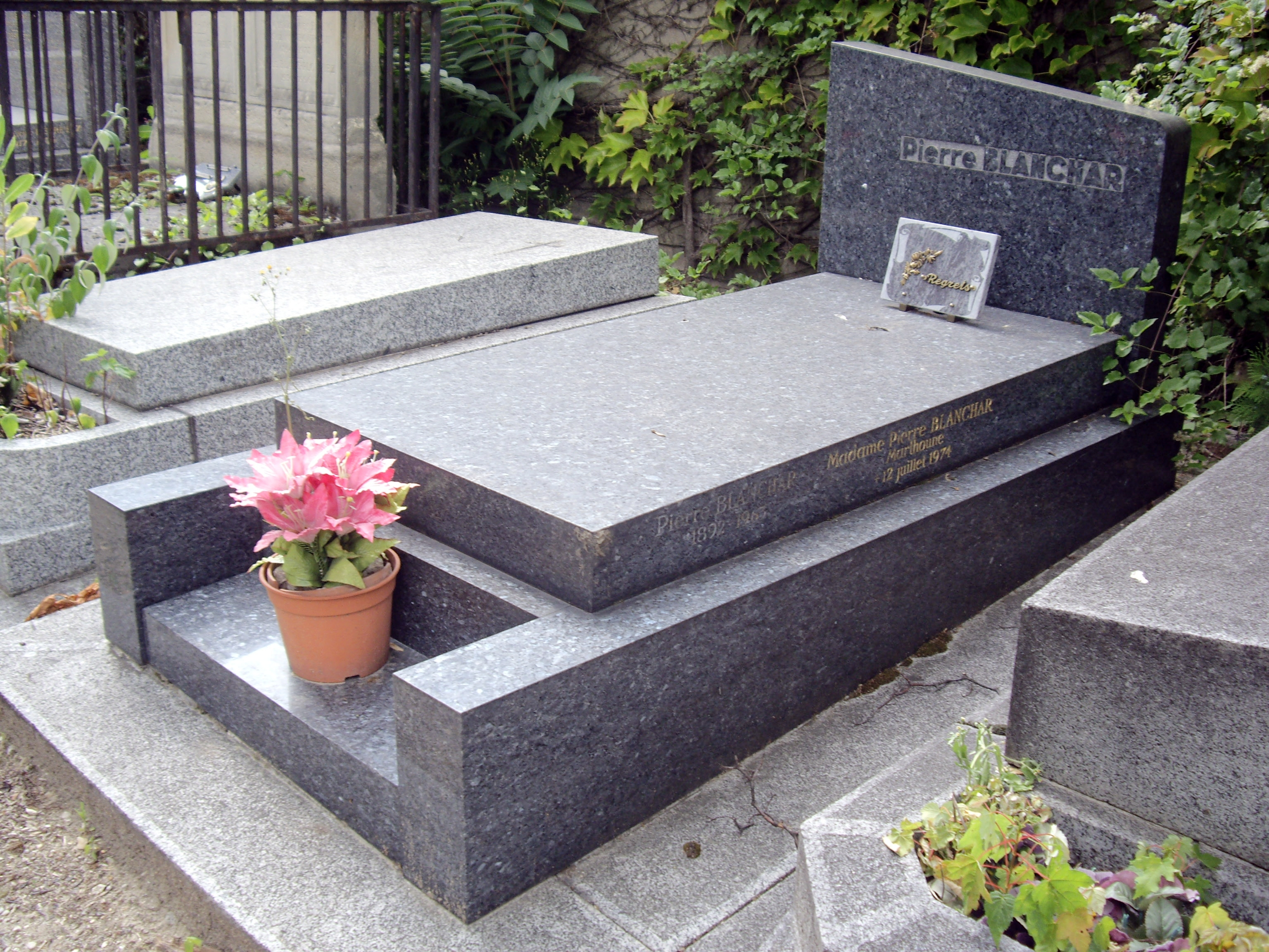 Tombe de Pierre Blanchar, cimetière de Charonne, Paris 20e.